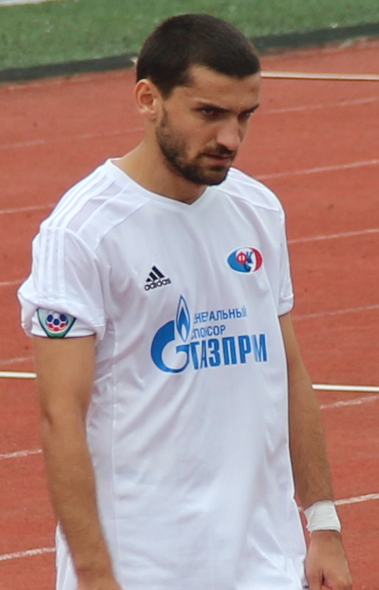 Кахелишвили Гиорги